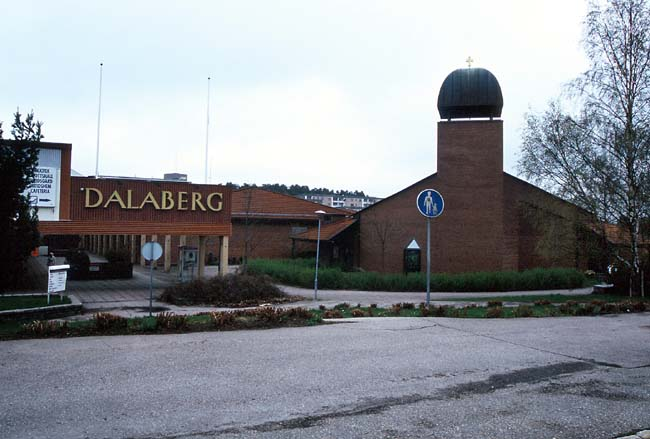 Dalabergskyrkan